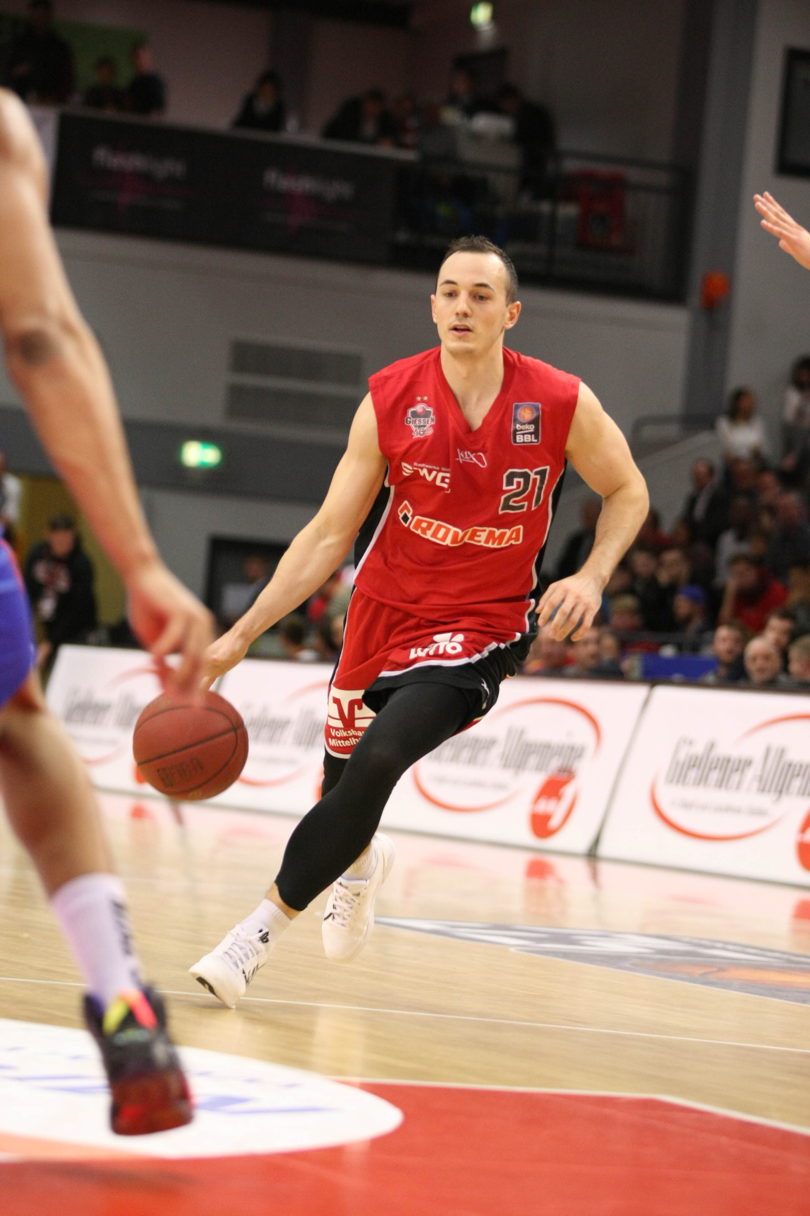 Giessen 46ers / Basketball Löwen Braunschweig (73-71)